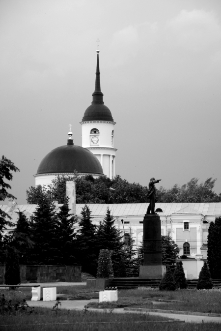 awaitng the rain in Kaluga